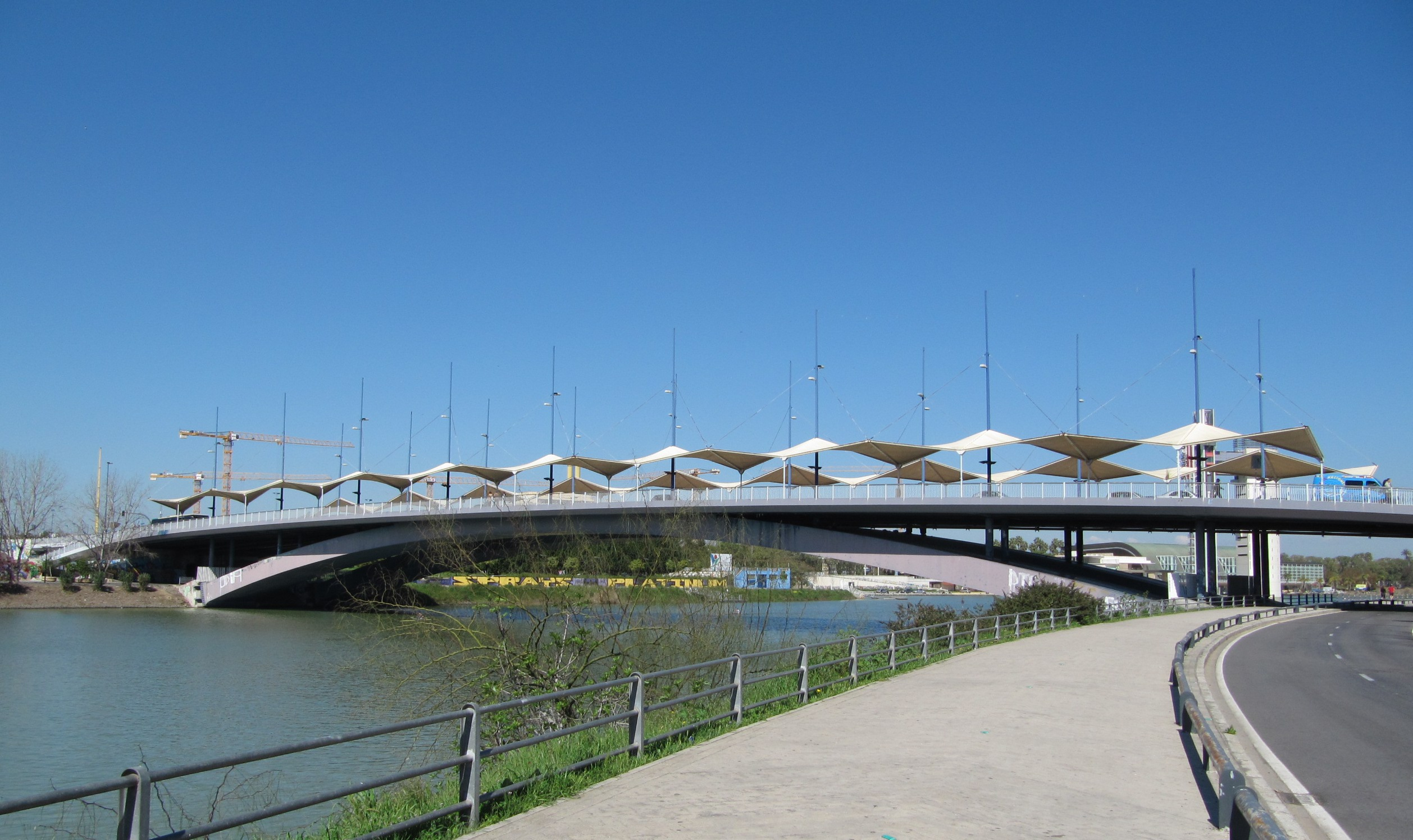 Sevilla - March 2011 - 095.jpg